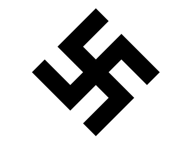 U